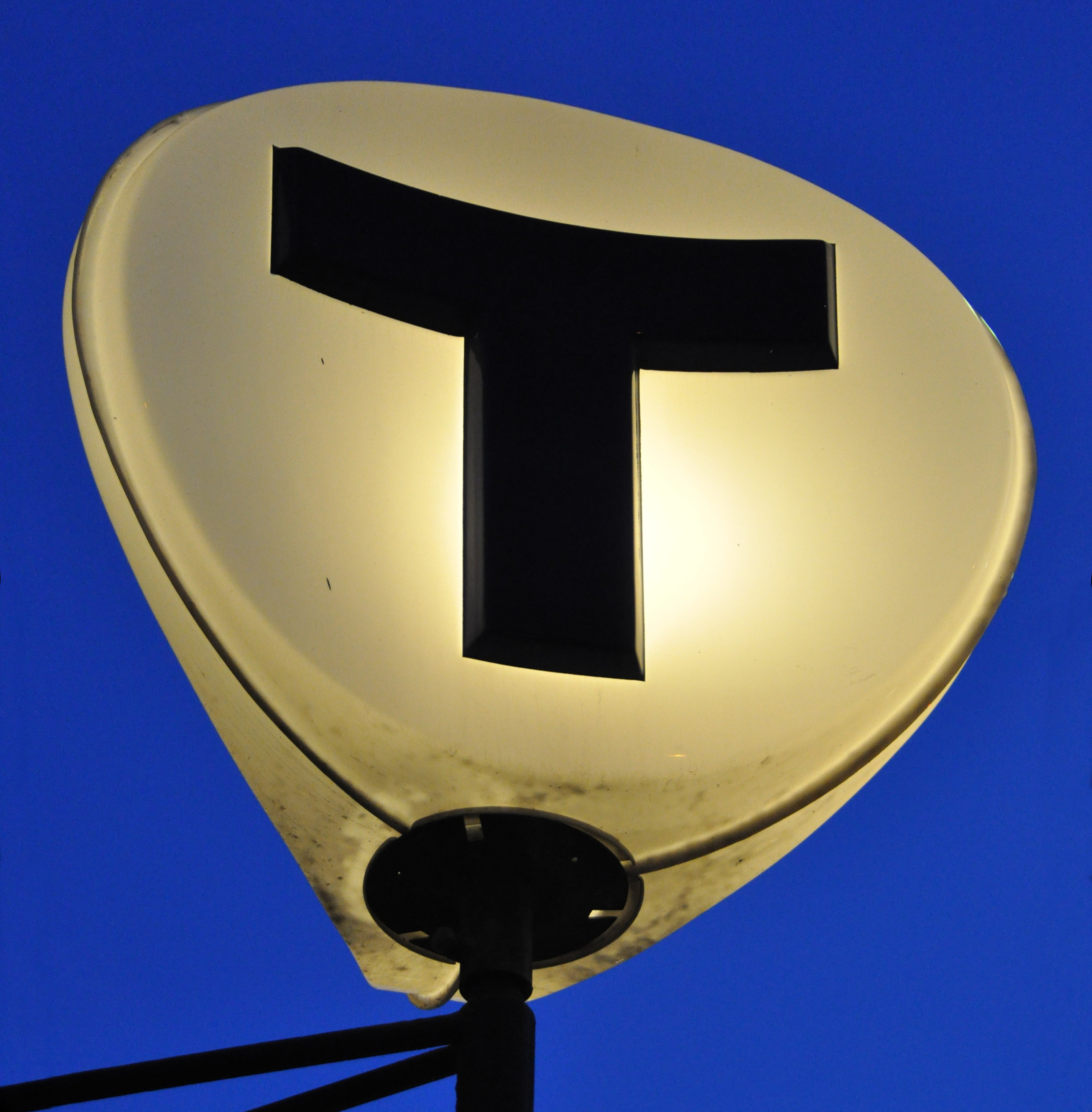 T-symbolen i skymning